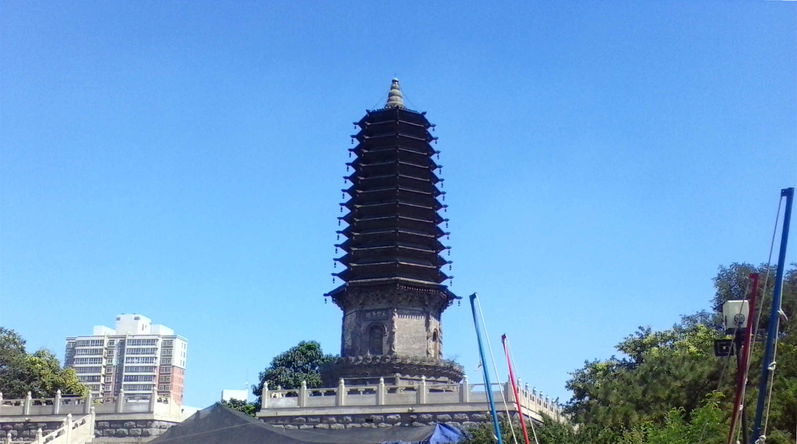 中文（中国大陆）: 唐山天宫寺塔